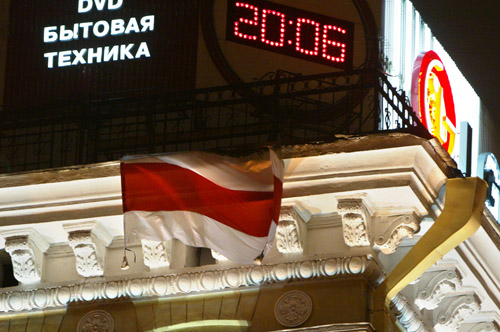 Бело-красно-белый флаг в труднодоступных местах - почерк легендарного Мирона